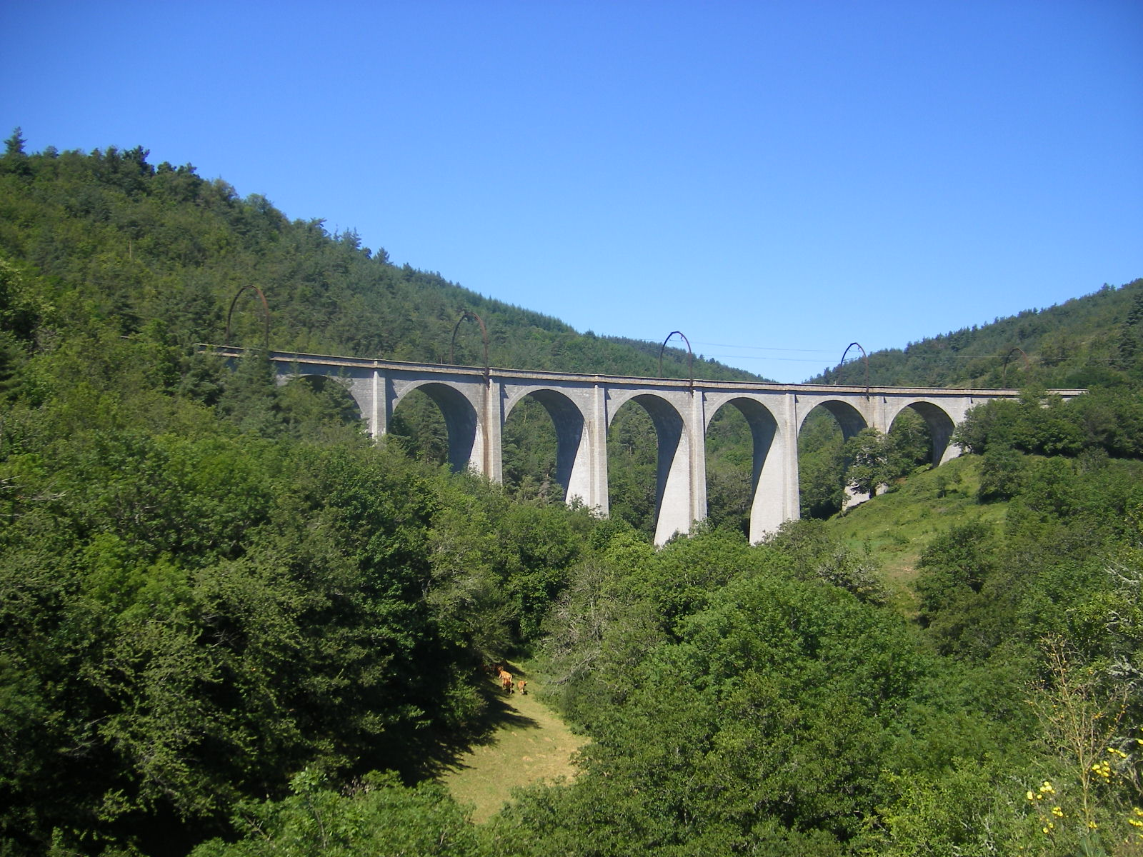 Bridge in Combettes (commune Le Buisson)